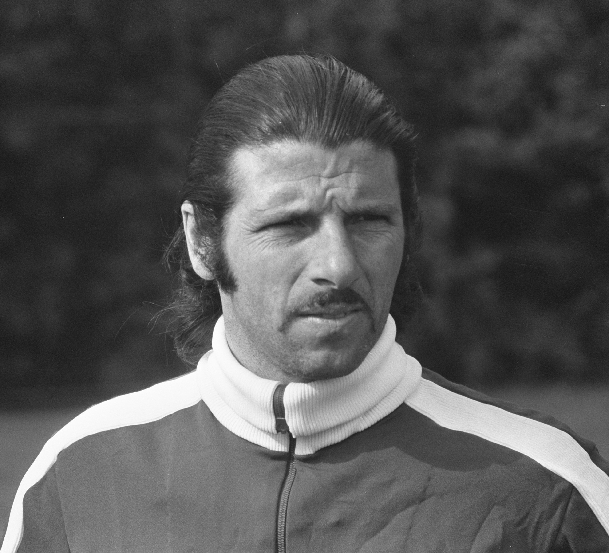 Training van Independiente voor wedstrijd tegen Ajax, trainer Ferreiro